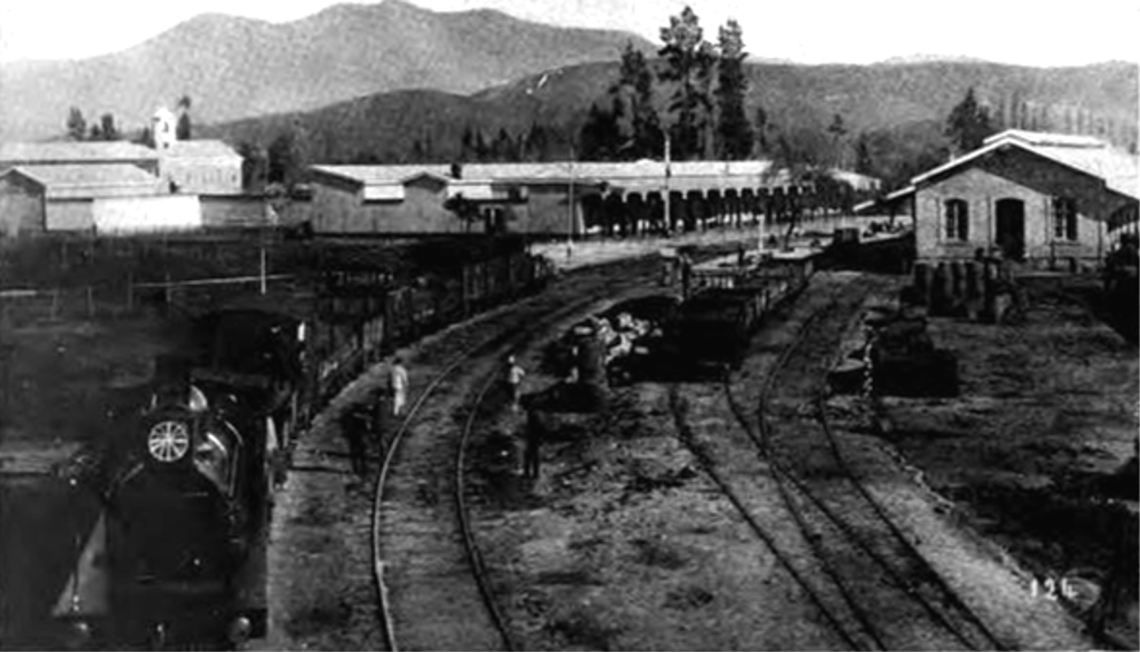 Estación Limache, 1901. This file has been extracted from another file: Chileatpanameri00buffgoog 0108.jpg